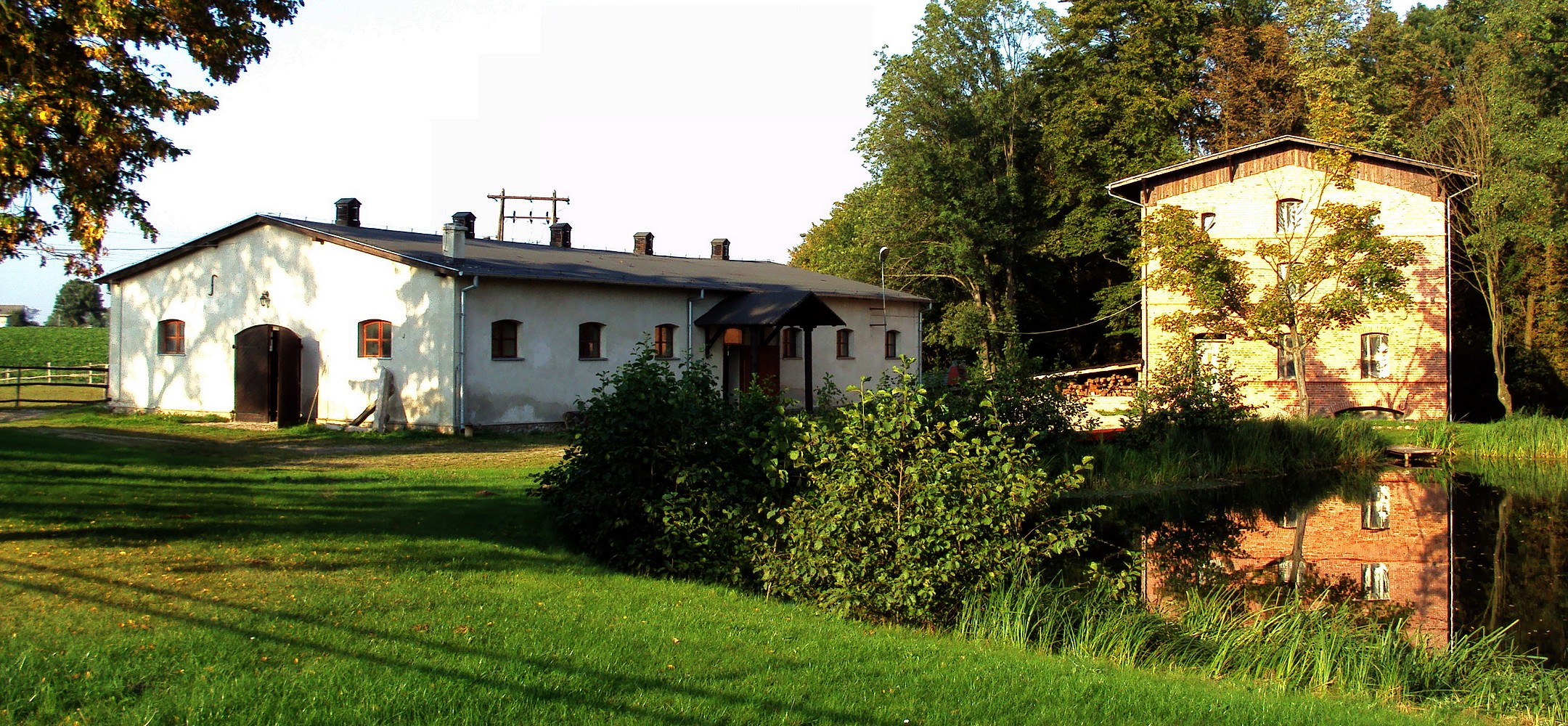 park; młyn wodny, k. XIX; obora, ob. stajnia, XIX/XX (dec. spichrz)